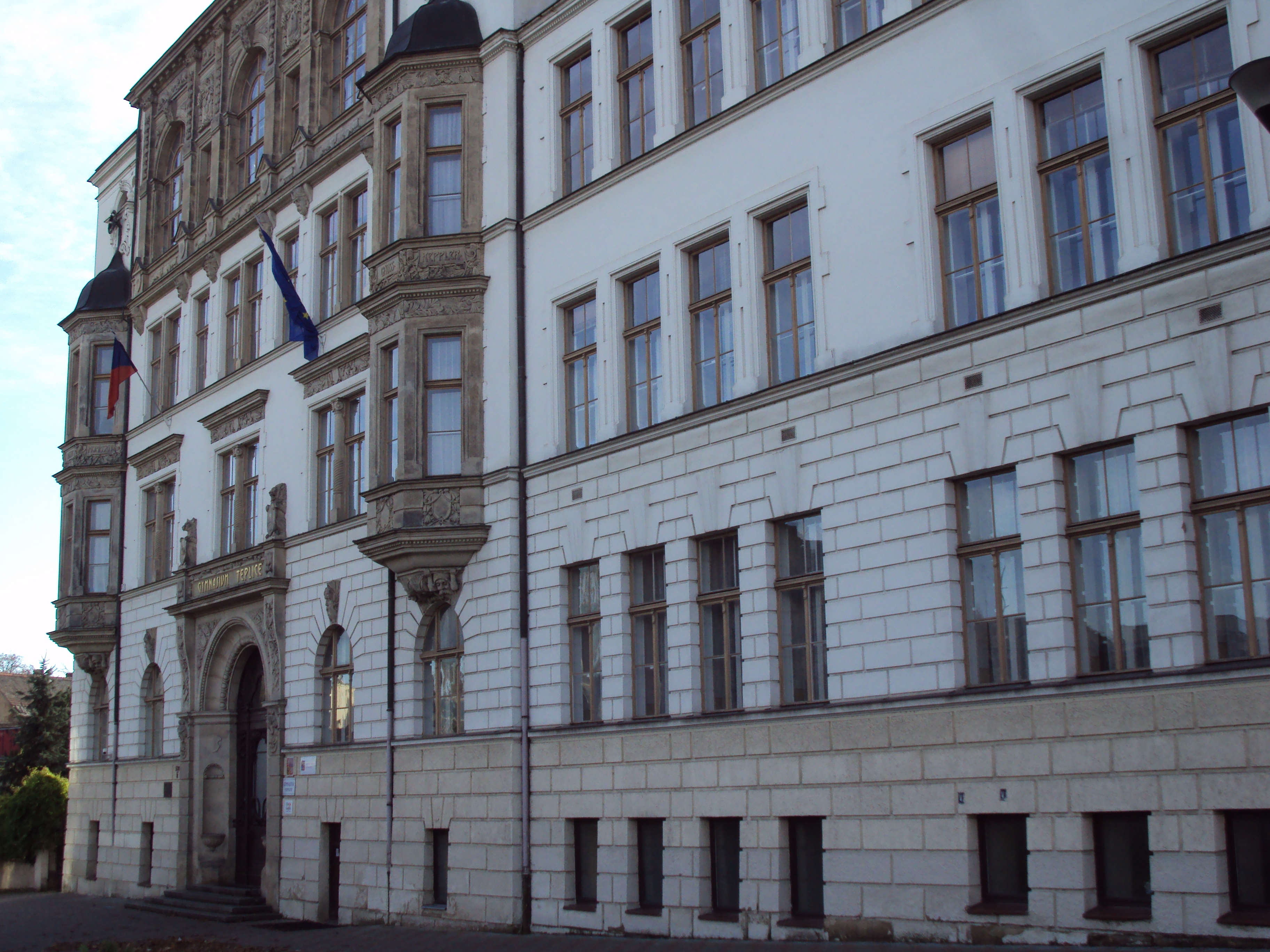 Gymnázium, hlavní budova ul.Dobrovolců v Teplicích